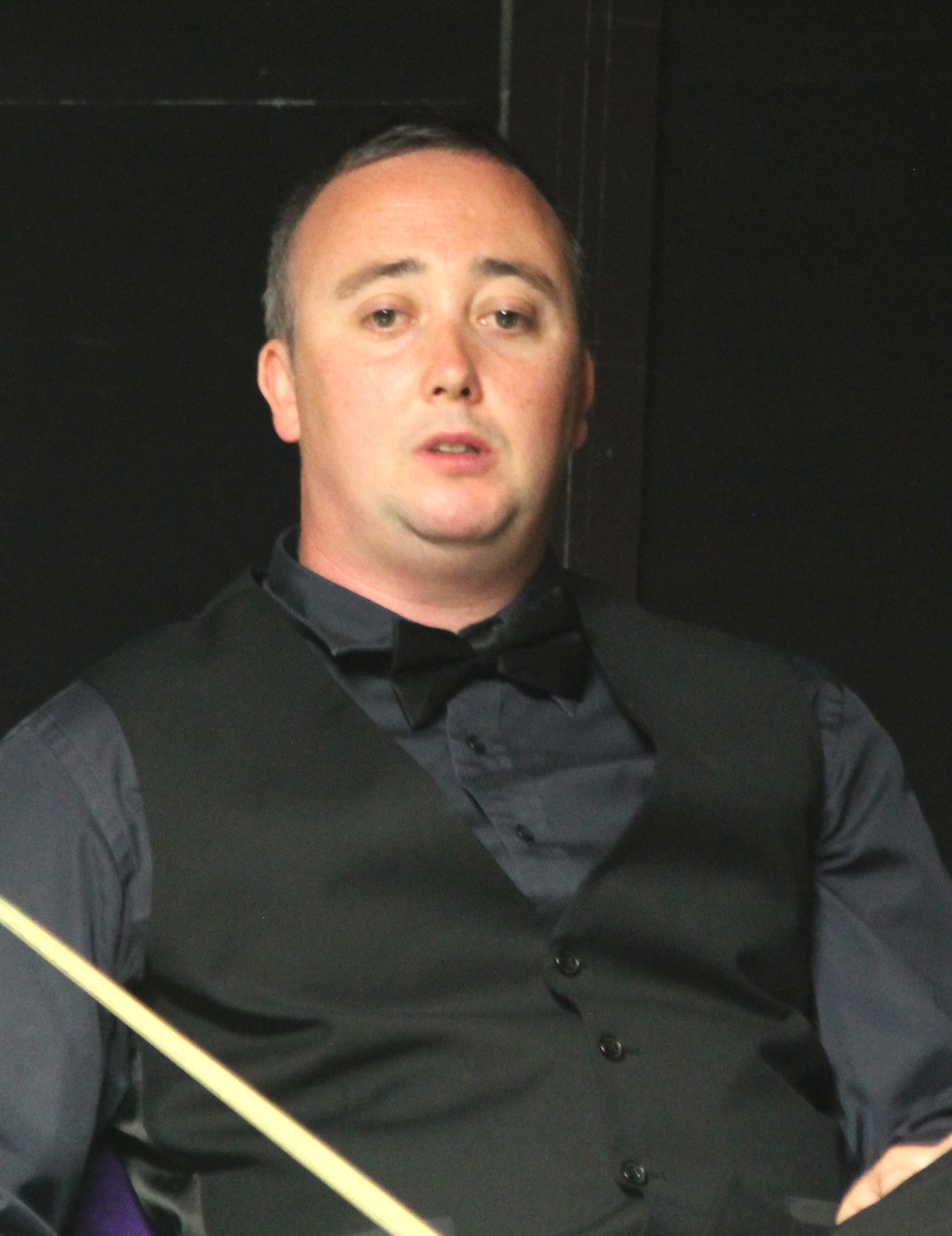 Ian Glover beim Paul Hunter Classic 2016